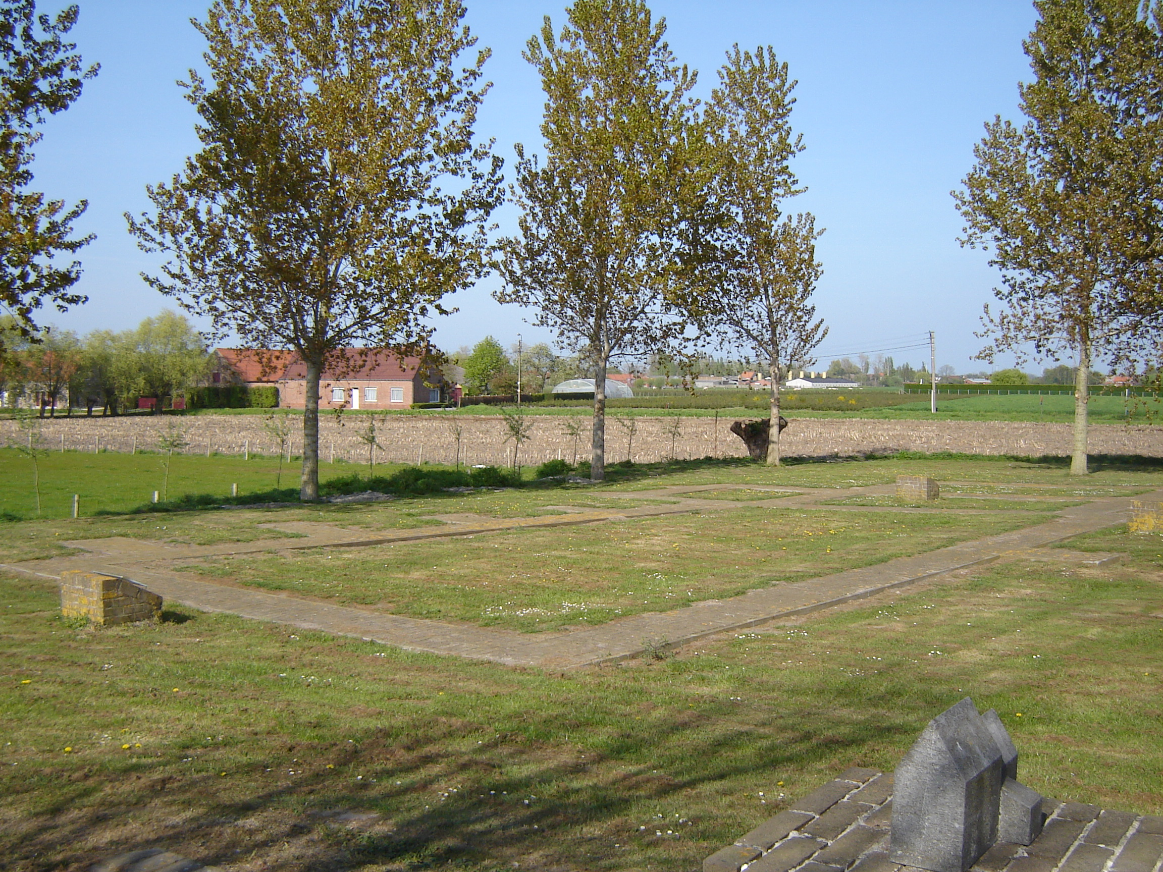 Locatie van de oude romaanse parochiekerk van Roksem (voor 16de eeuw)Location of old romanesque parish church of Roksem (before 16th century). Roksem, Oudenburg, West Flanders, Belgium